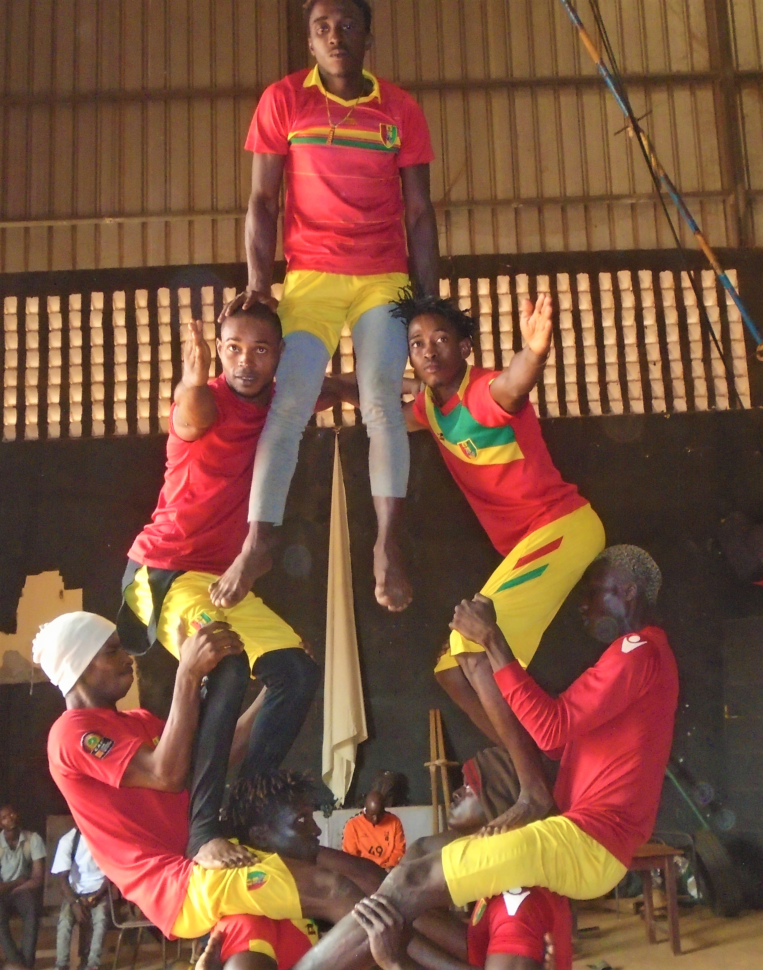 Acrobate du cirque tinafan